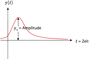 Amplitude